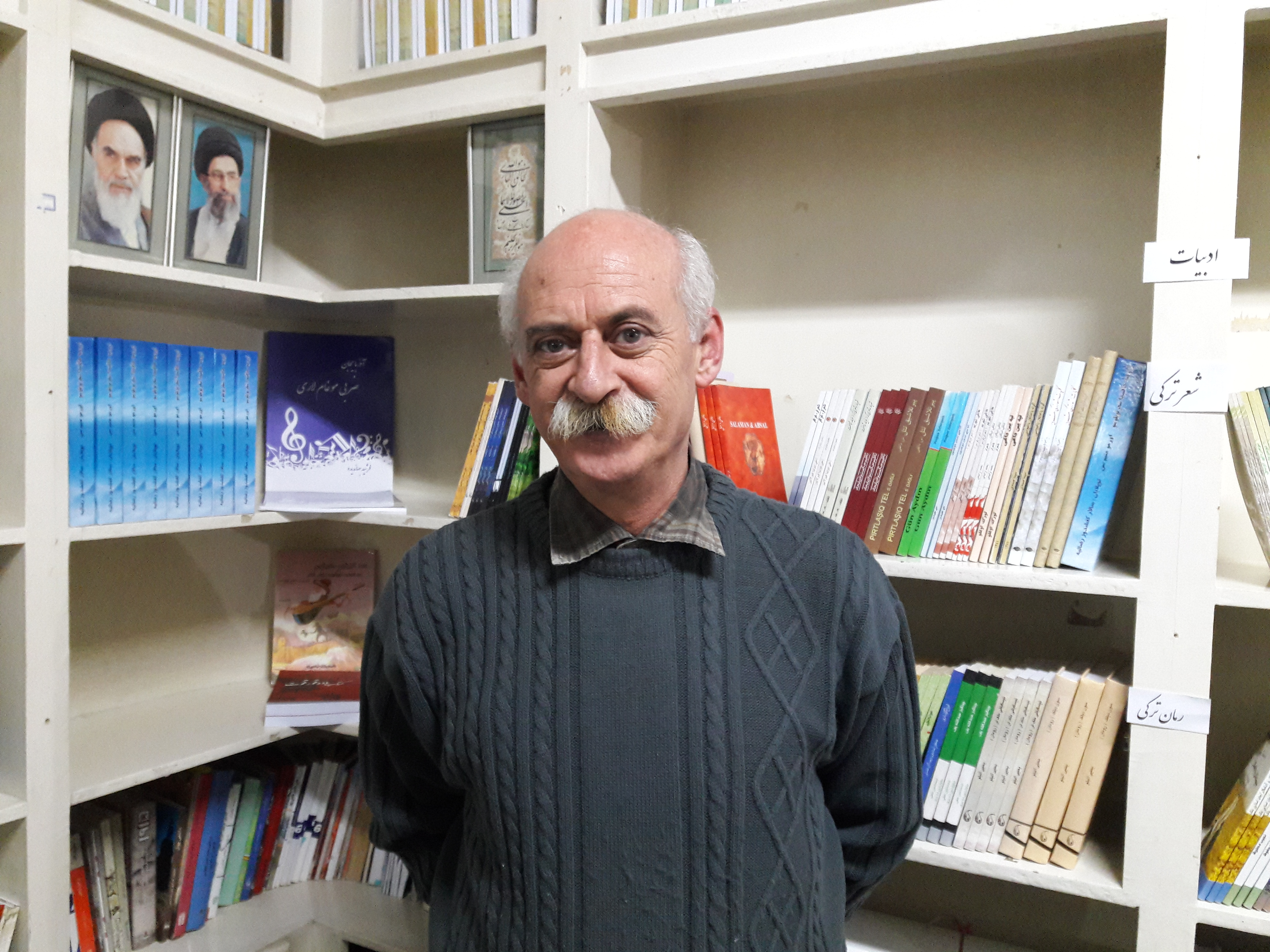 تۆرکجه: رضا تقی‌زاده (اوزان)